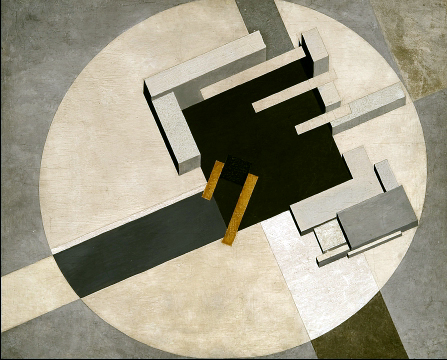 El Lisitski - Şəhər (Supermatizm)